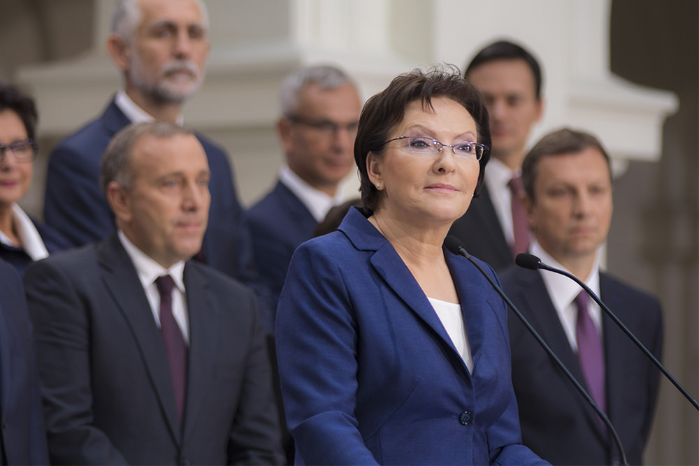 Przedstawienie kandydatów na ministrów w rządzie Ewy Kopacz